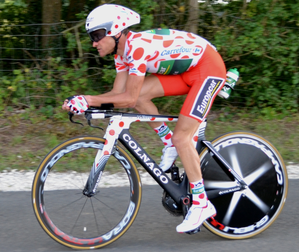 Thomas Voeckler TDF2012